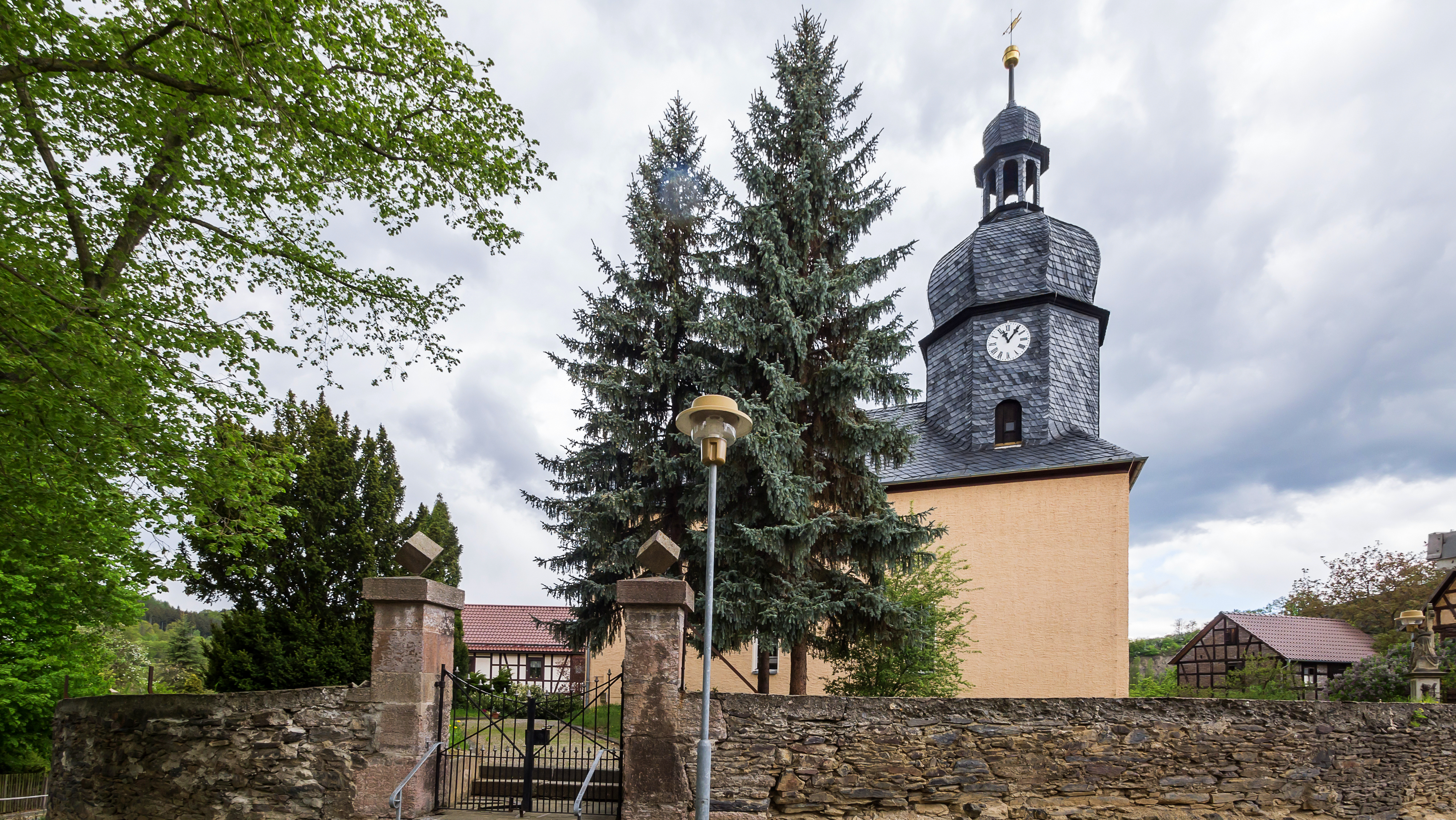 Eichicht Schloßstraße Kirche mit Ausstattung, Kirchhof und Einfriedung